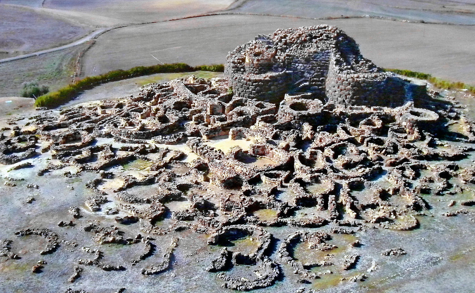 Nuraghe et son environnement